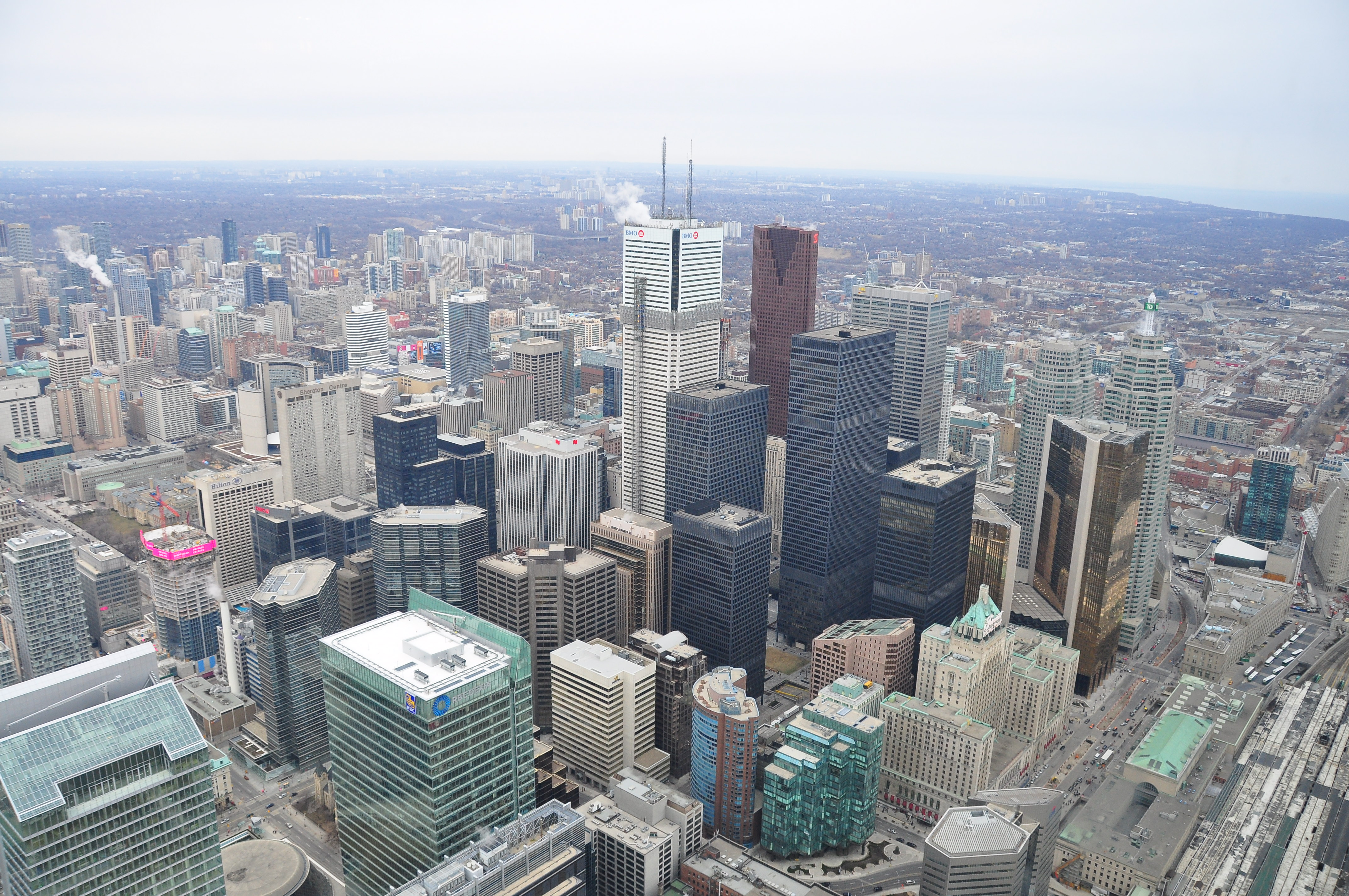 Toronto